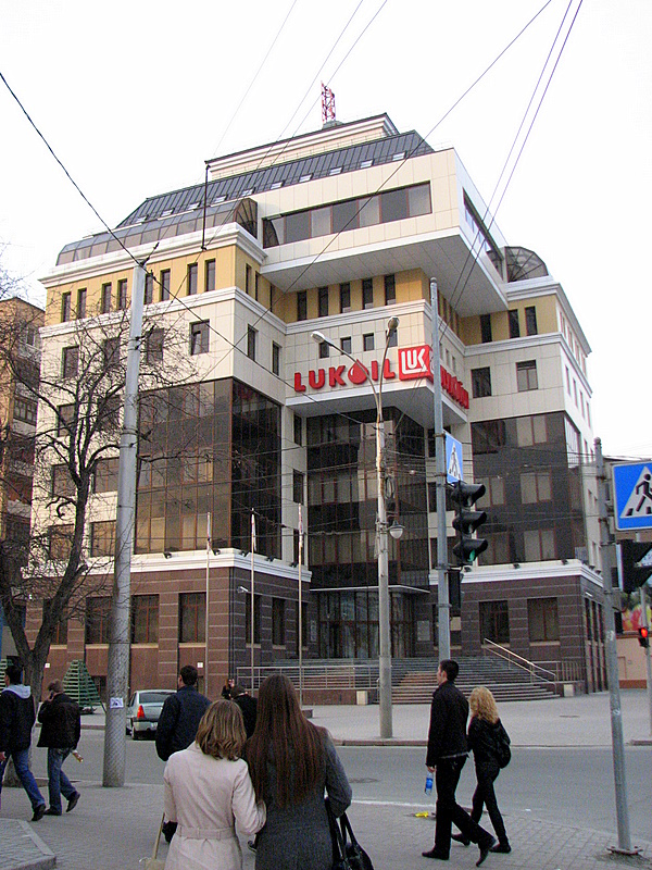 La oficejo de la kompanio Lukoil (Tjumeno, Rusio)